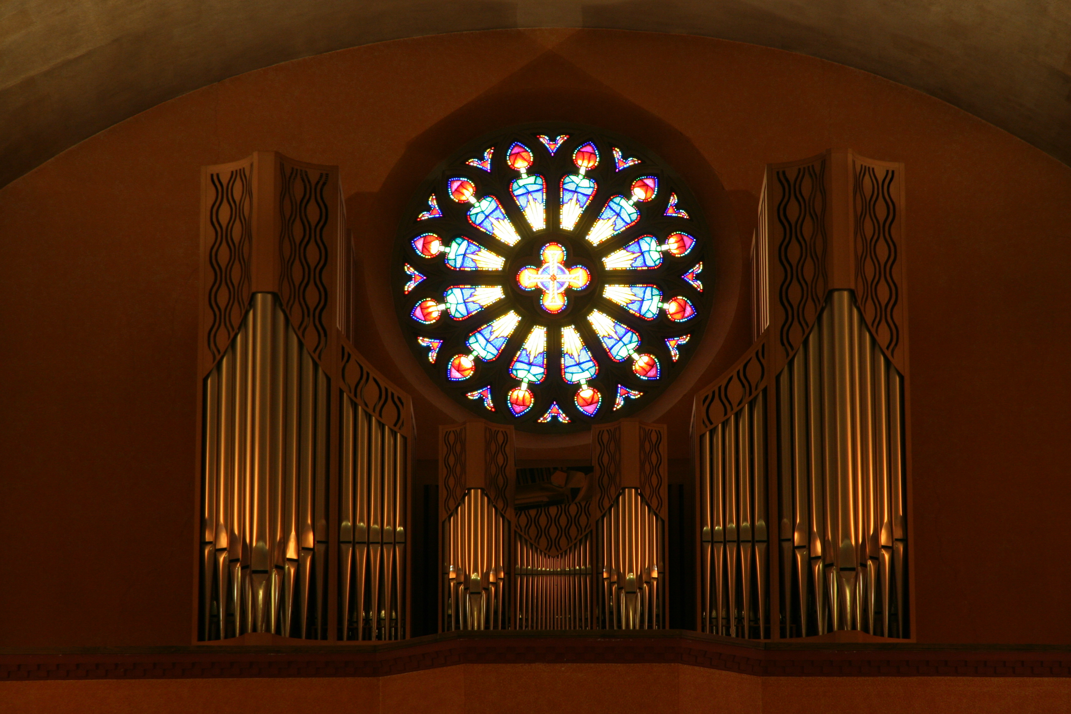 Römisch-katholische Pfarrkirche St. Maria Biel/Bienne, Kuhn-Orgel von 1979 in der Oberkirche